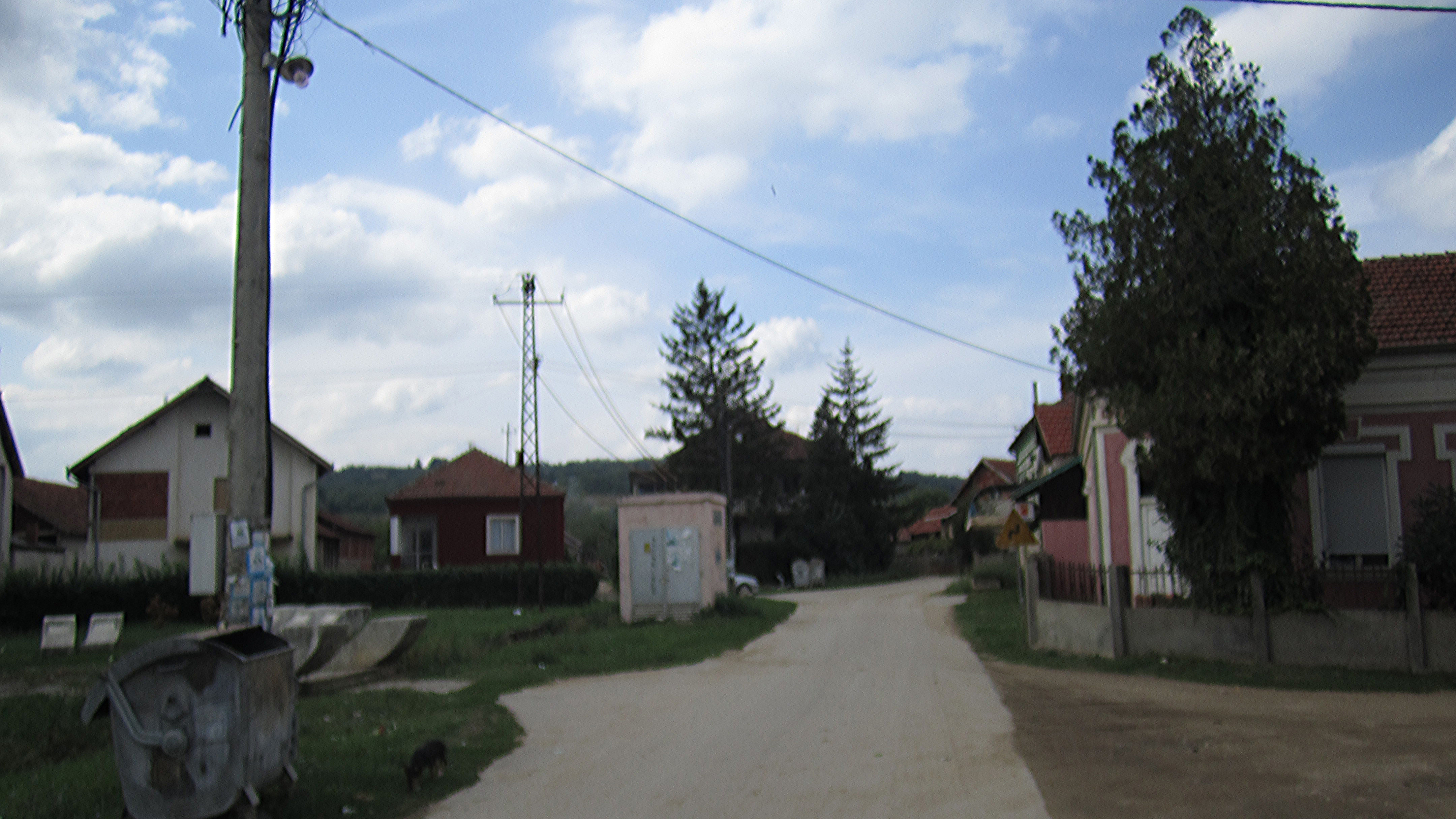 Srpski (latinica): Priboj, Leskovac